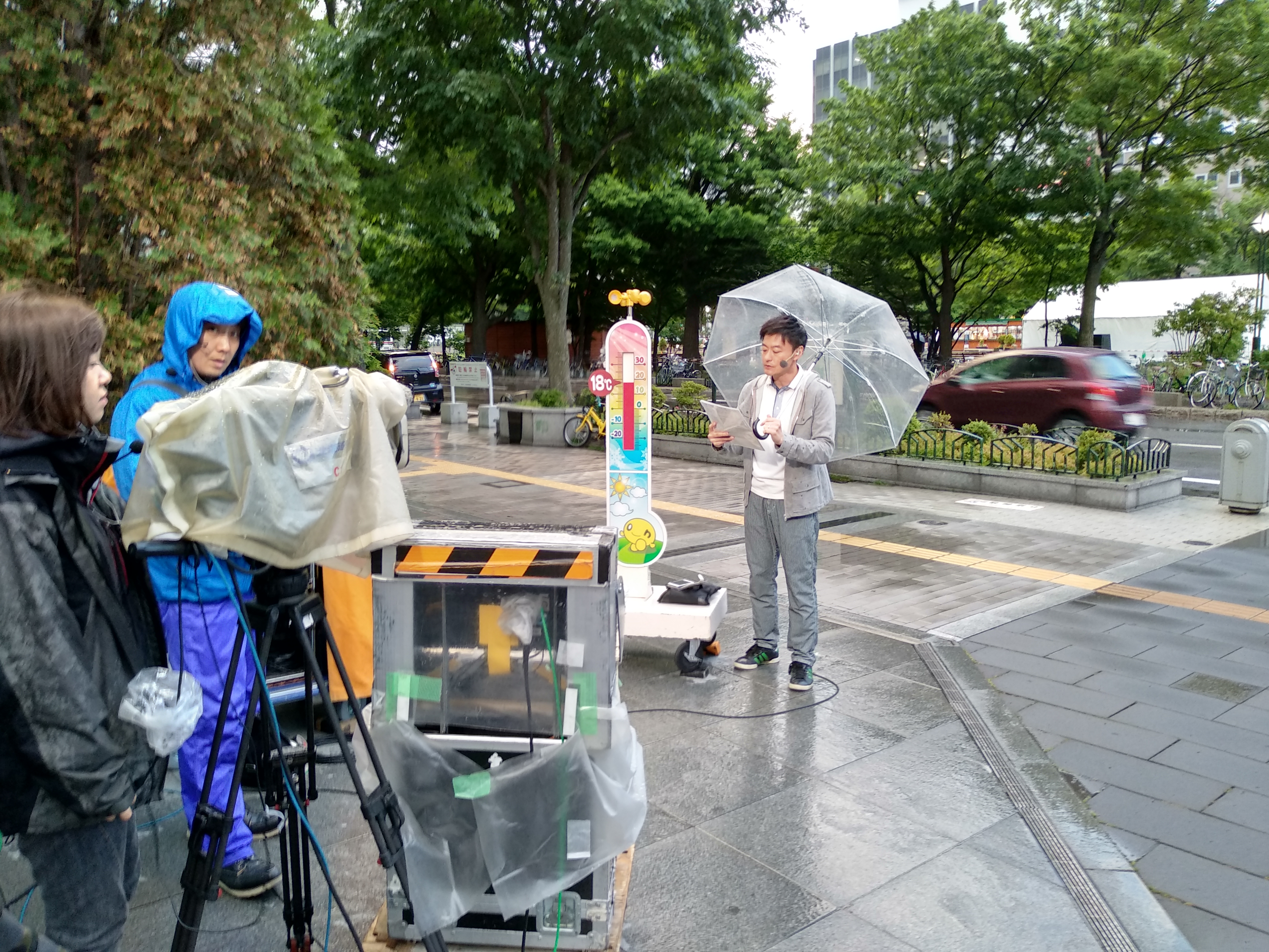 神田昭一 ? onちゃん